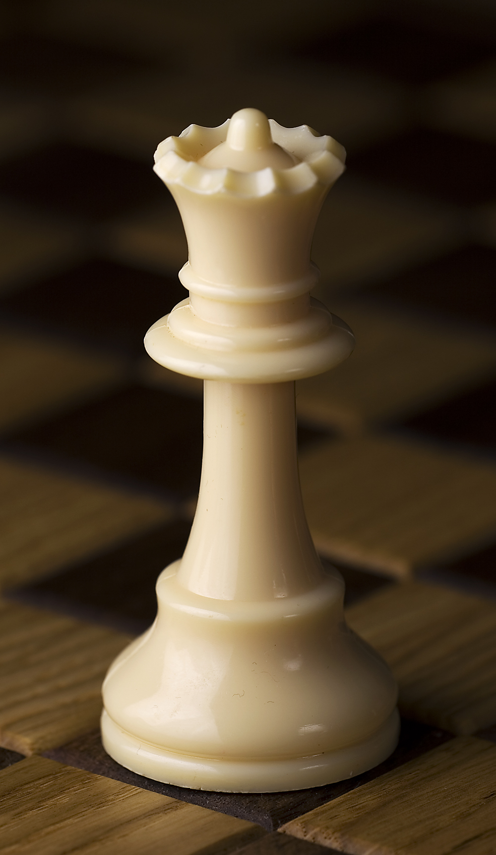 Chess piece - White queen, Staunton design